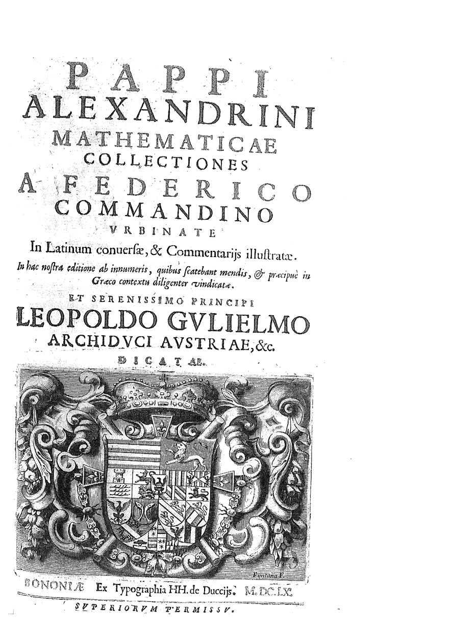 Pappi Alexandrini Mathematicae collectiones a Federico Commandino Vrbinate in latinum conuersae, & commentarijs illustratae. - Bononiae : ex typographia hh. de Duccijs, 1660 (Bononiae : ex typographia hh. de Ducijs, 1658). - [10], 490, [2] p. : ill., 1 ritratto calcografico ; 2° .